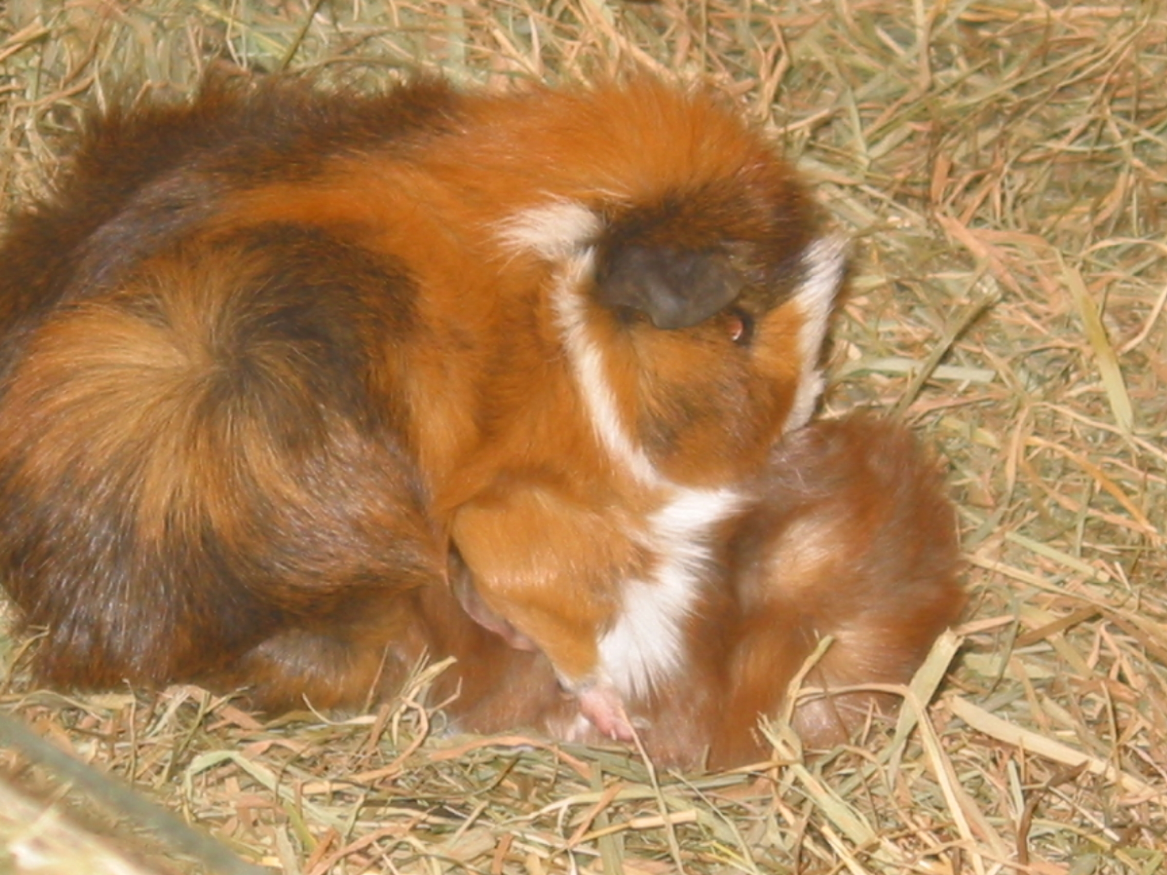 Säugendes Meerschweinchen own picture, made bei Christina Scholz